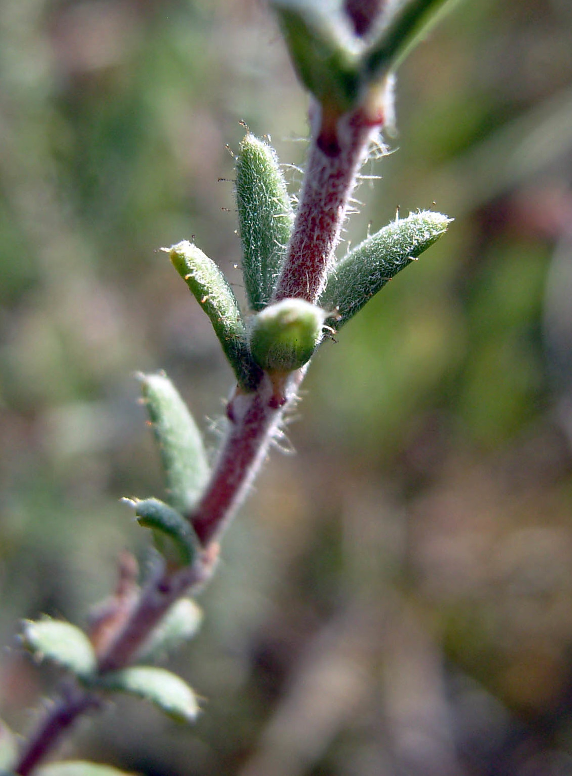 Zweig der Glocken-Heide (Erica tetralix), Nordwestdeutschland